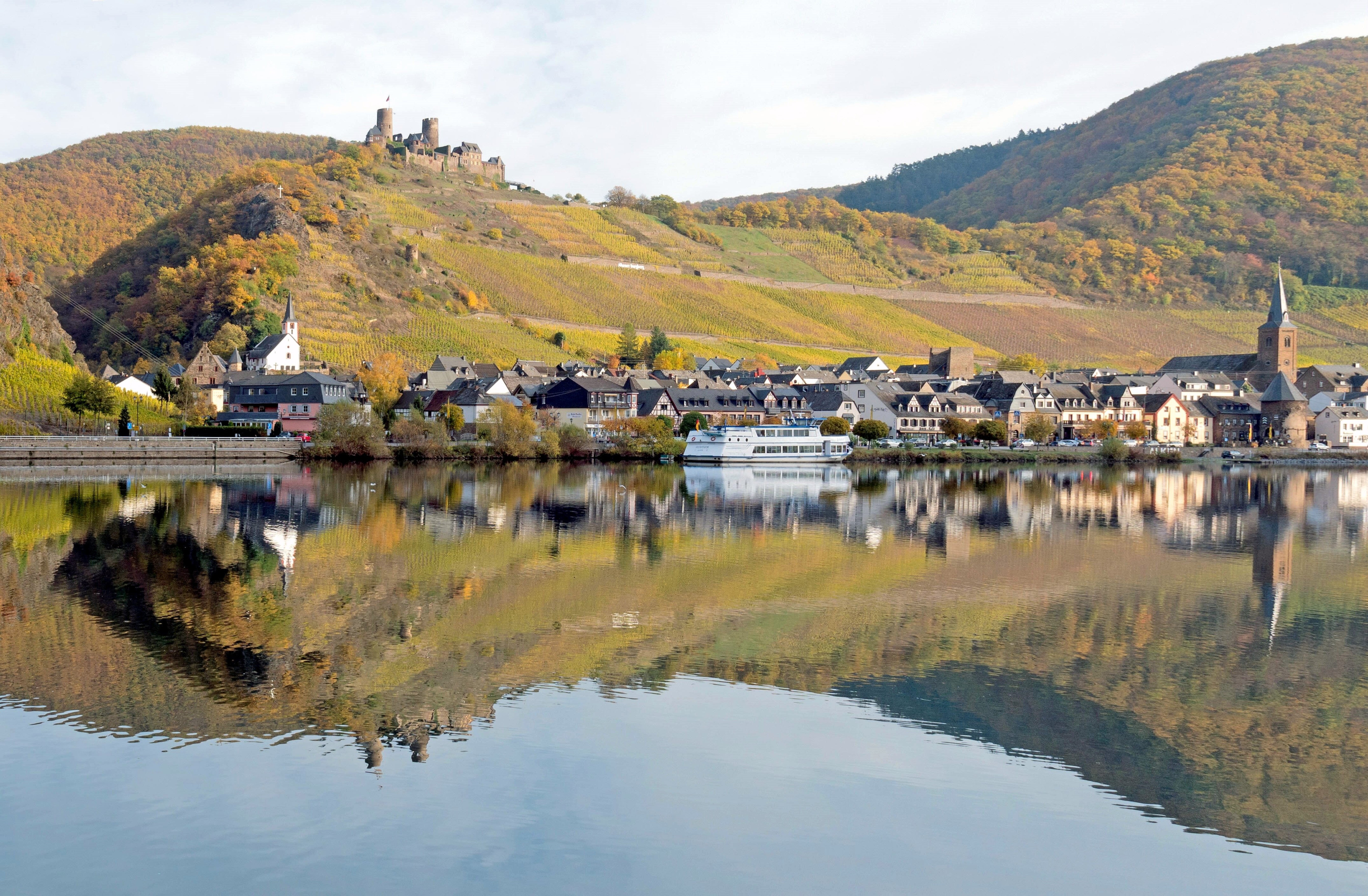 Alken mit Burg Thurant, Stadtbefestigung, Michaelskapelle mit Beinhaus